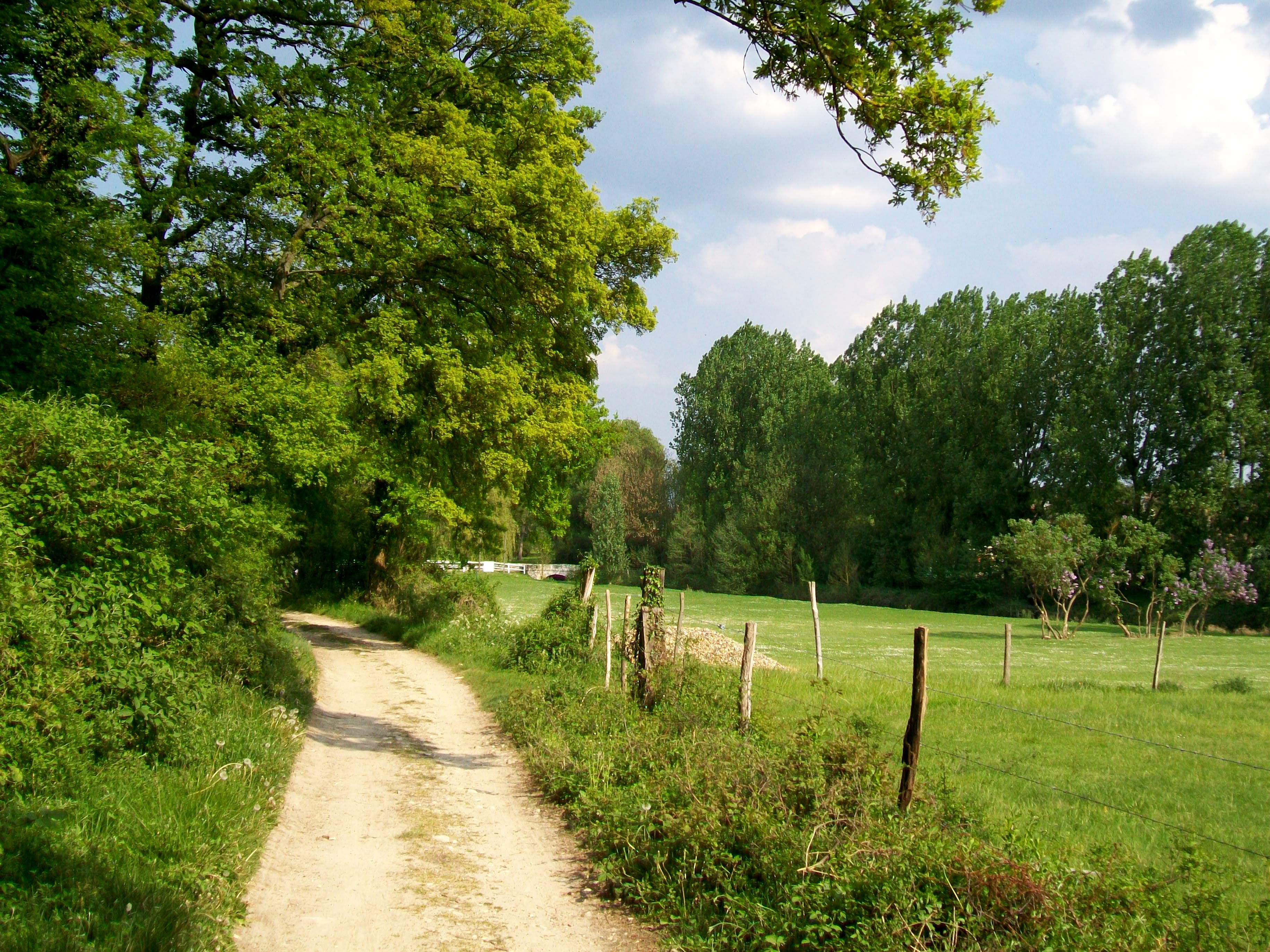 Le chemin rural n° 28 dit des Loges, qui mène de Pontarmé au hameau de Montgrésin (commune d'Orry-la-Ville).